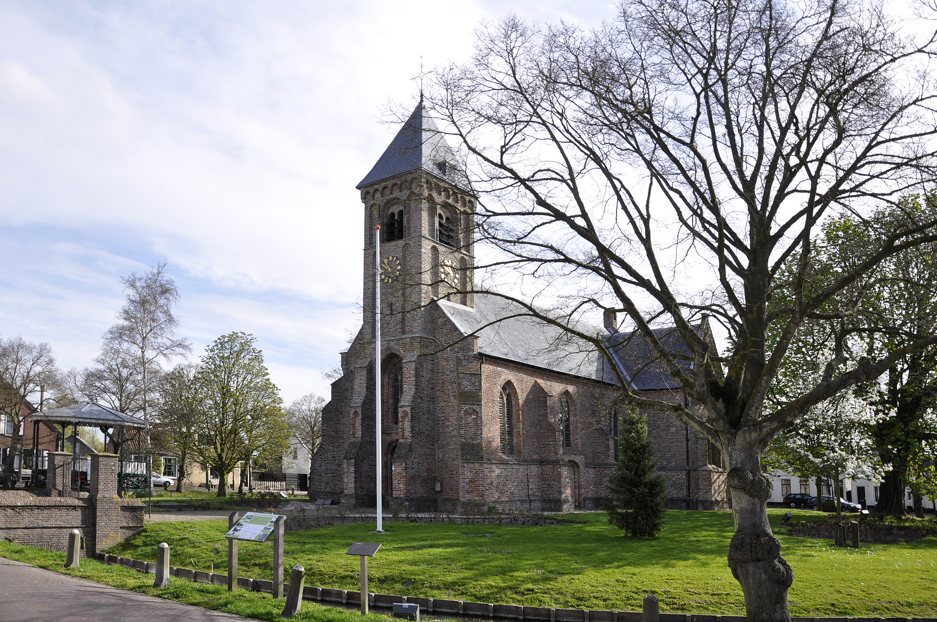 De Driekoningenkerk te Noordgouwe, Zeeland